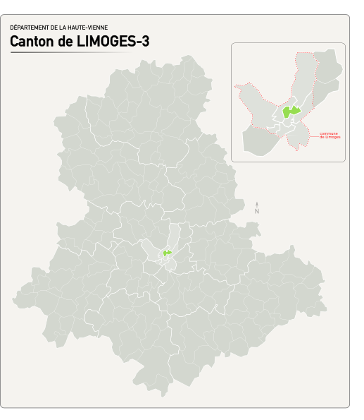 Carte du nouveau canton de Limoges-3.